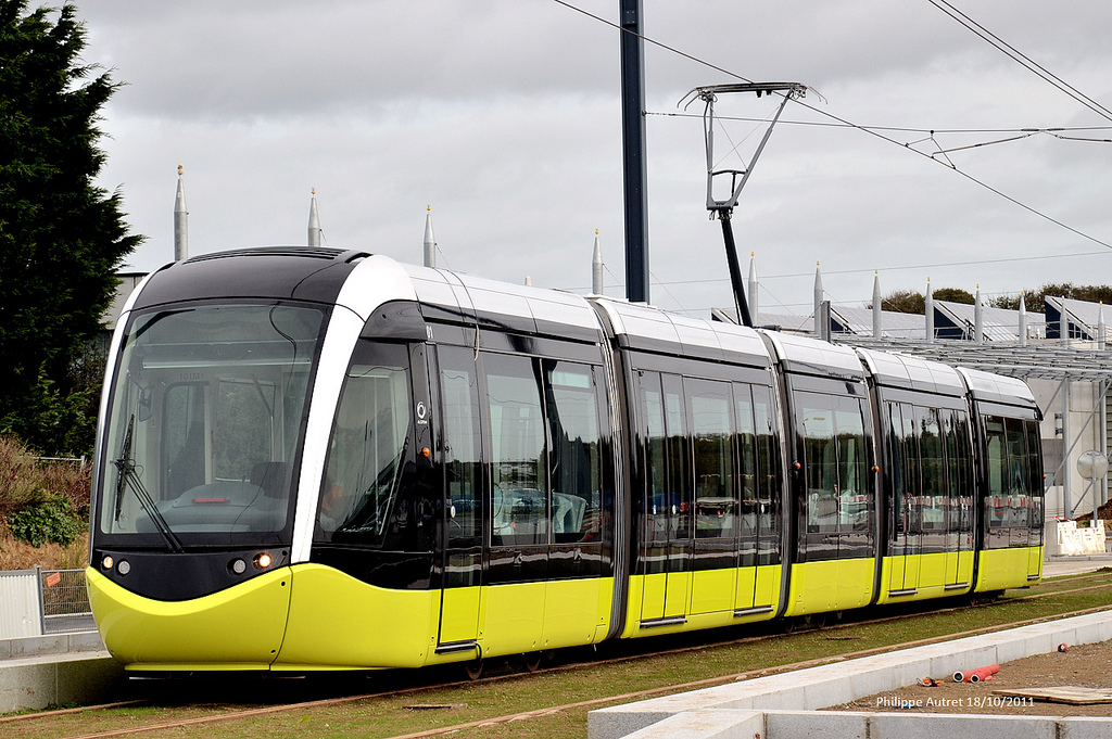 Tramway de Brest entre le dépôt et Thales.